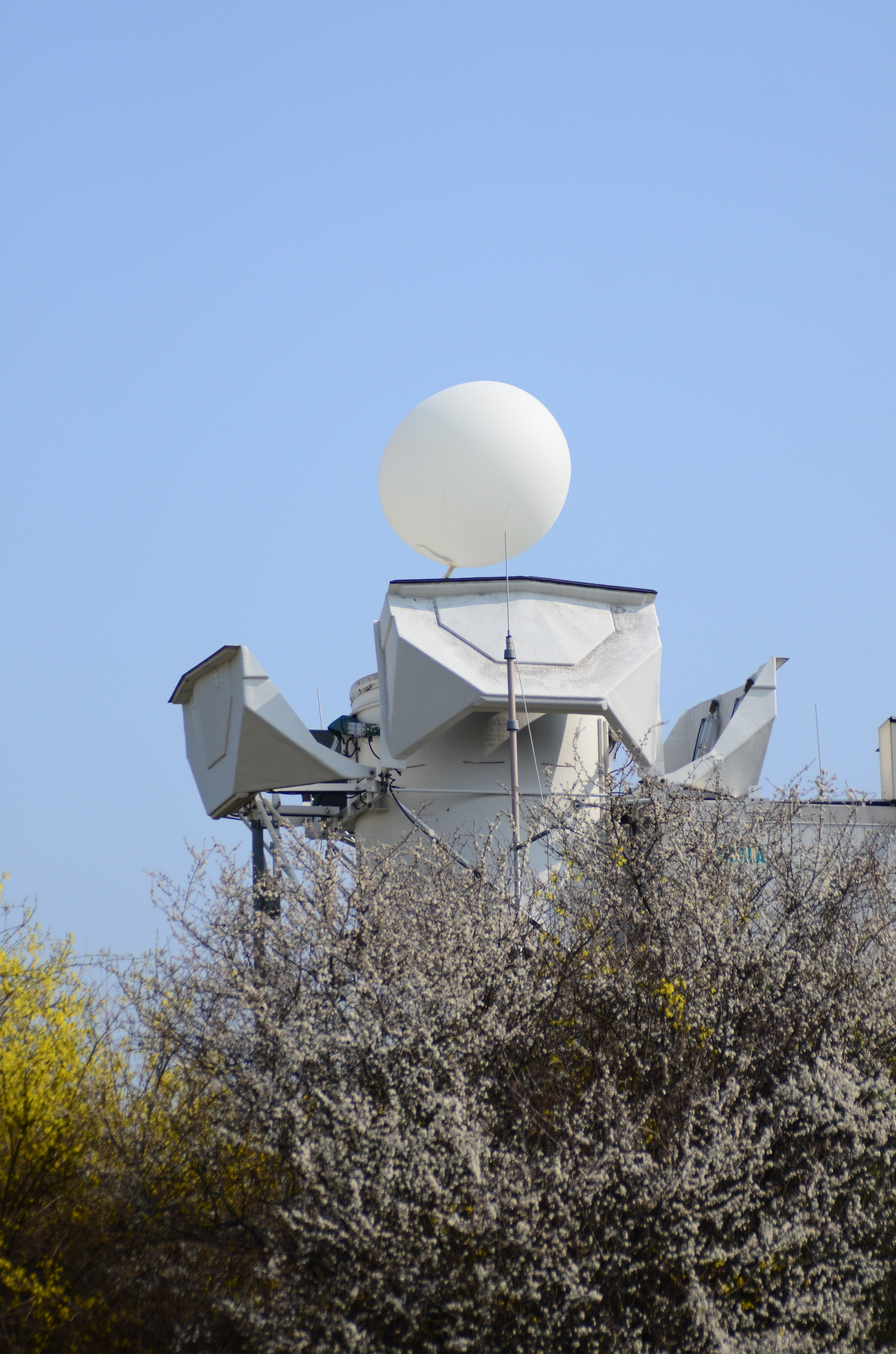 Aerologische Daten werden mit einem Wetterballon erhoben